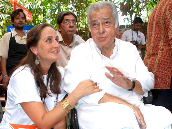 Shashi Kapoor at Prithvi Summertime 2010 launch